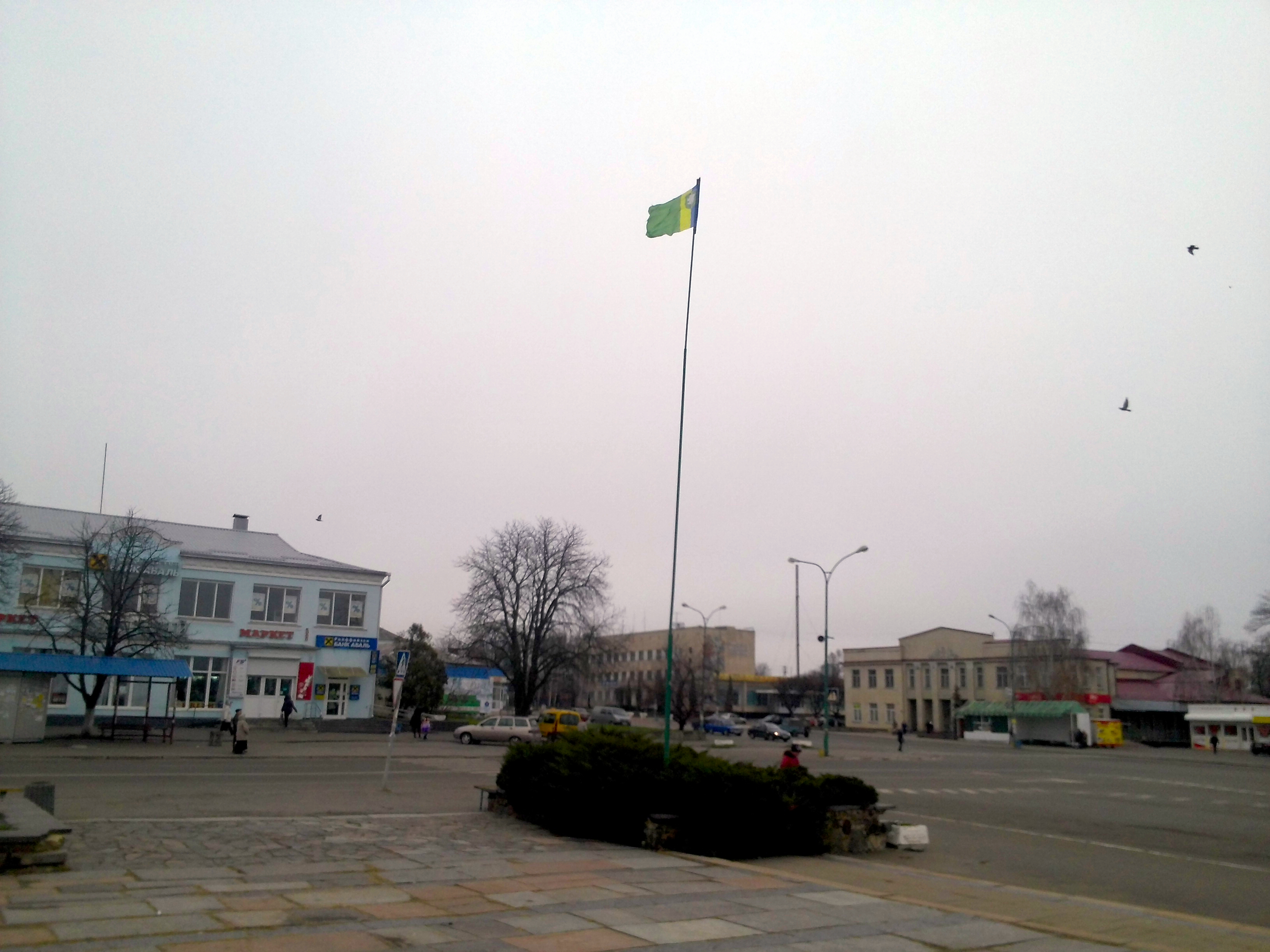 м. Малин